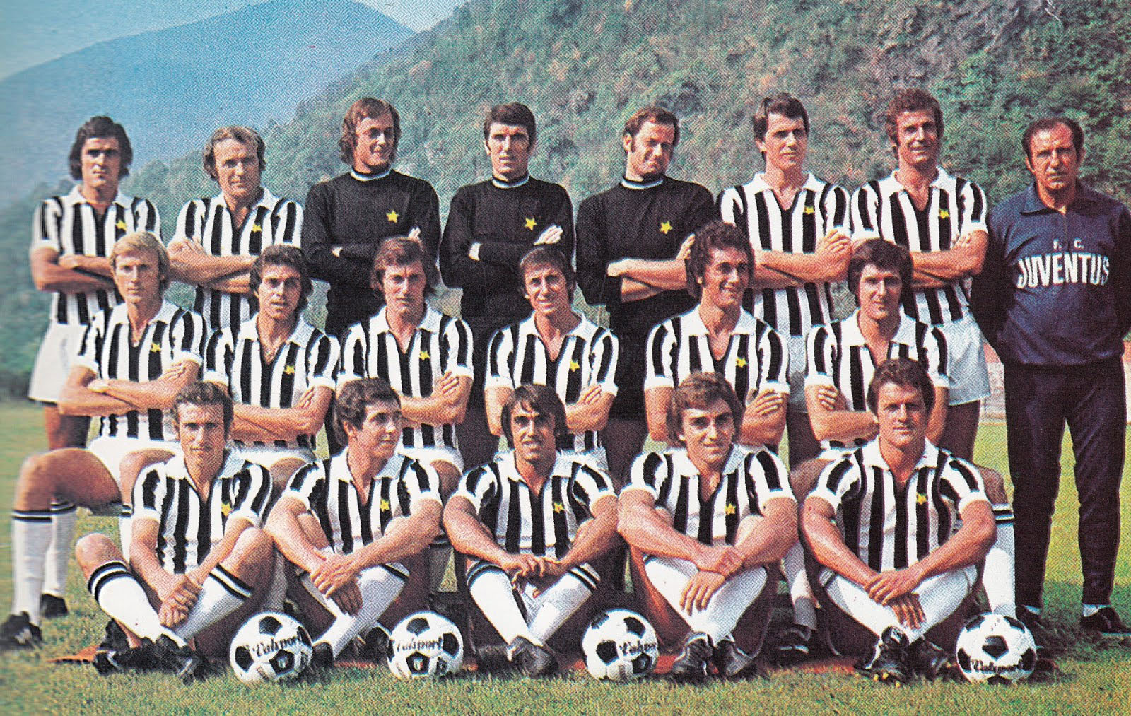 Villar Perosa (Italy), Summer 1974. The first-team squad of Juventus F.C. in the 1974–75 preseason. From left to right, top: A. Cuccureddu, J. Altafini, G. Alessandrelli, D. Zoff, M. Piloni, R. Bettega, L. Spinosi, C. Parola (head coach); centre: F. Morini, F. Causio, S. Longobucco, G. Furino, C. Gentile, G. Scirea; bottom: O. Damiani, D. Maggiora, P. Anastasi (captain), F. Viola, F. Capello.